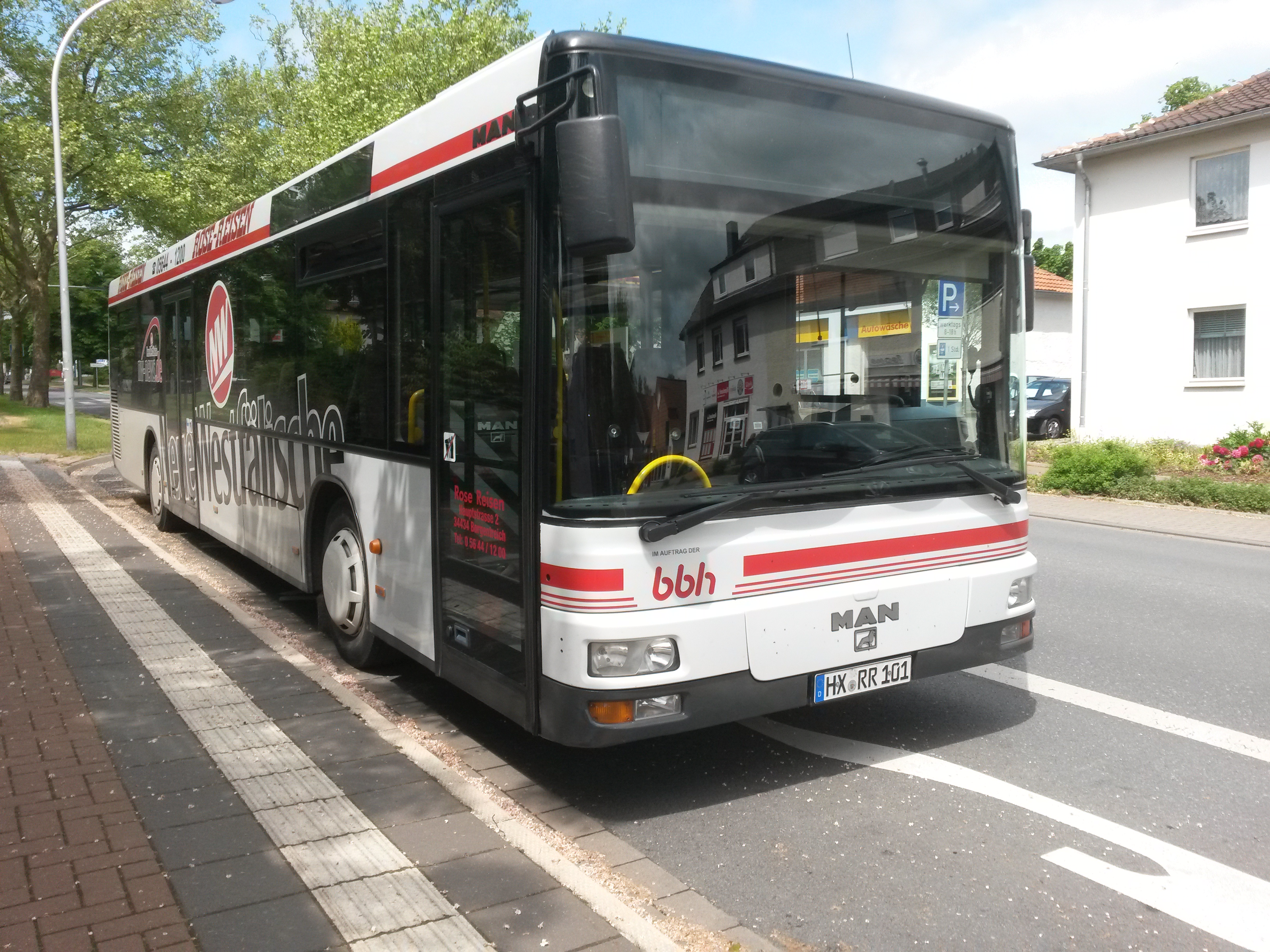 MAN NÜ des Reiseunternehmen Rose aus Großeneder in Warburg Bildrechte bei mir ( Leon Wegener